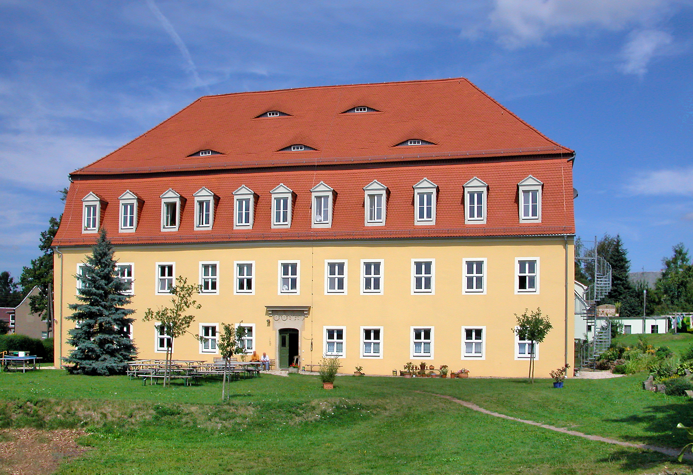 Herrenhaus Obermunzig (Munzig zu Klipphausen)